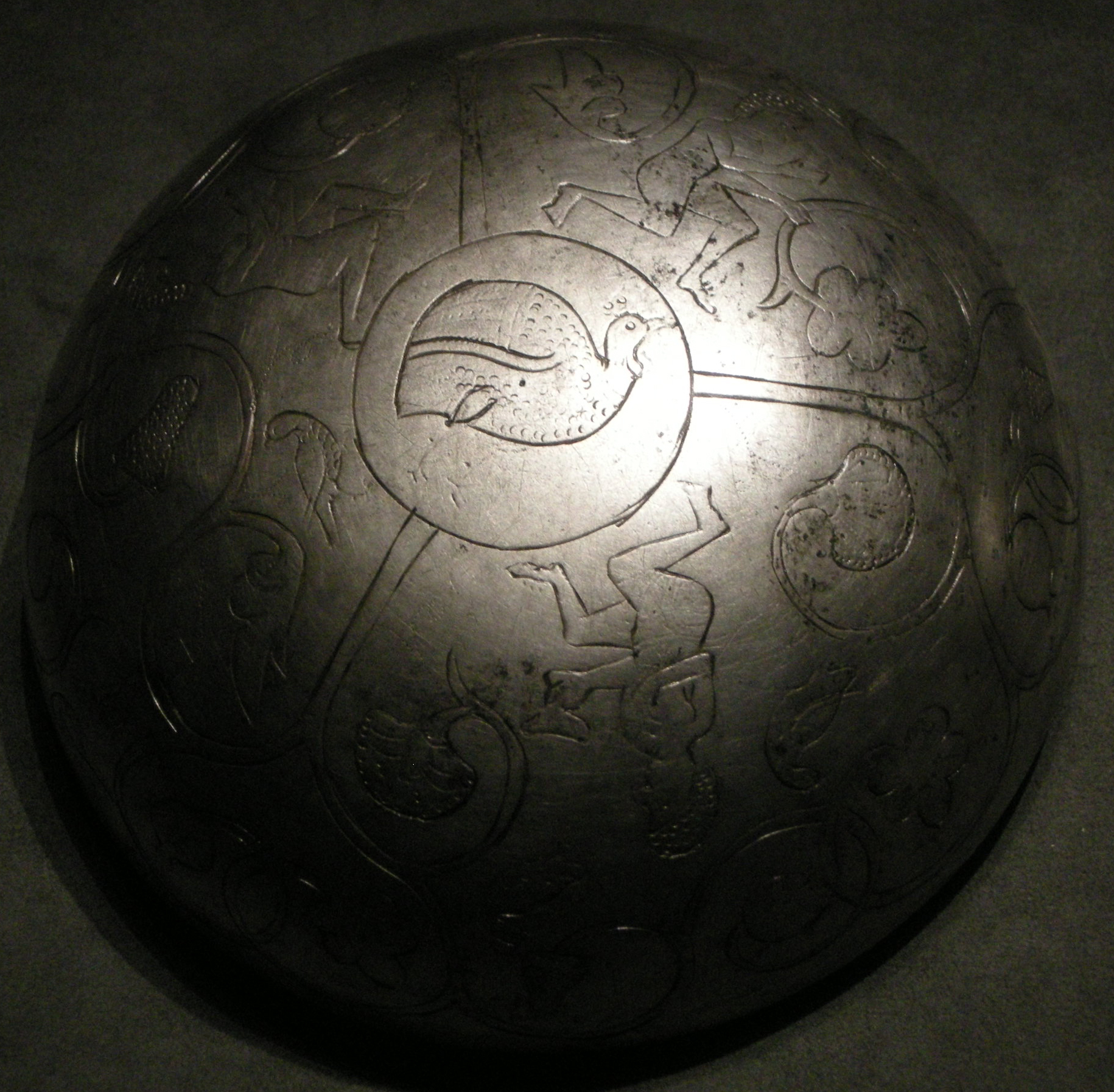 Persia, masandaran, coppa in argento, V-VI sec